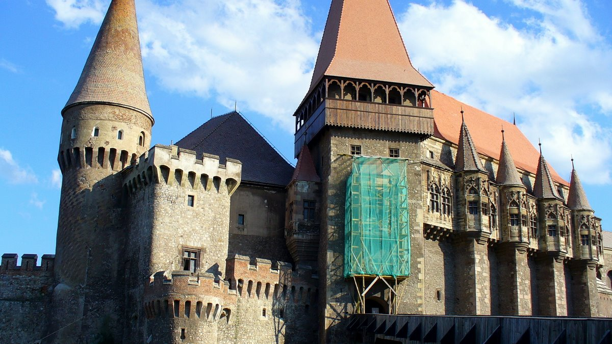 Castel Hunedoara